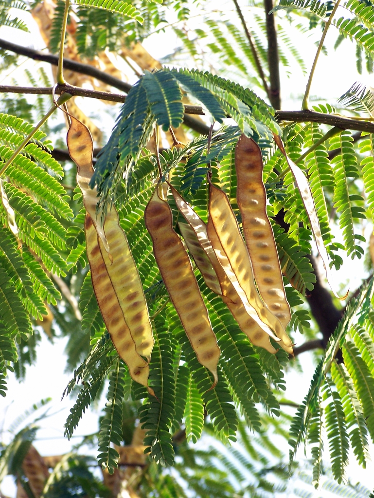 Albizia julibrissin (Acacia de Constantinopla) : Frutos semi-maduros - Parque del Buen Retiro, Madrid Capital (España).